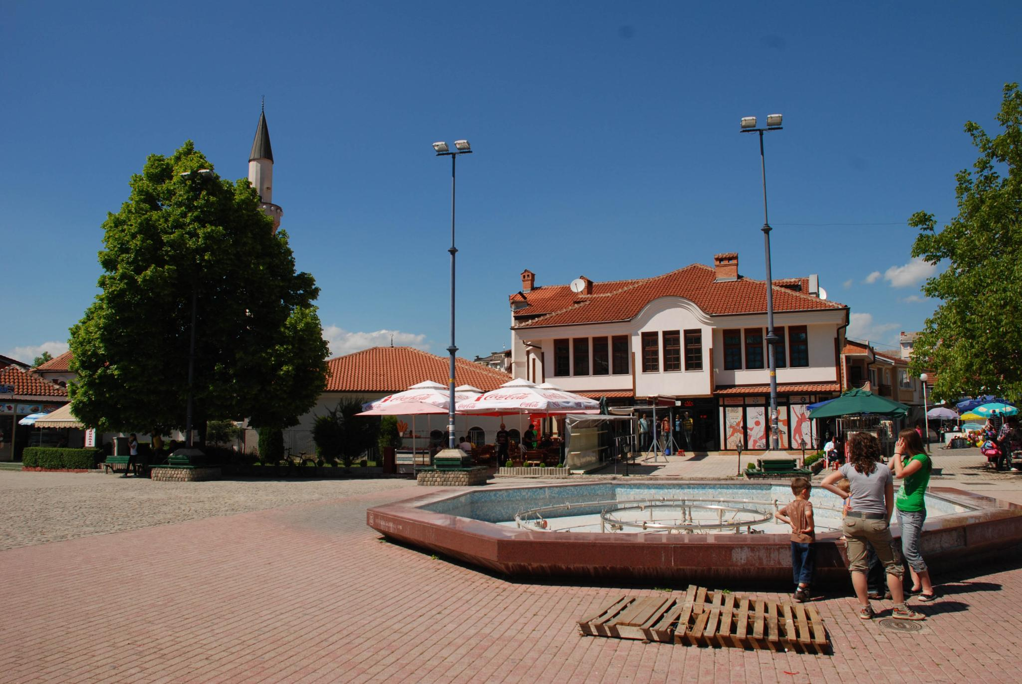 Ohrid Ohrid, Macedonia